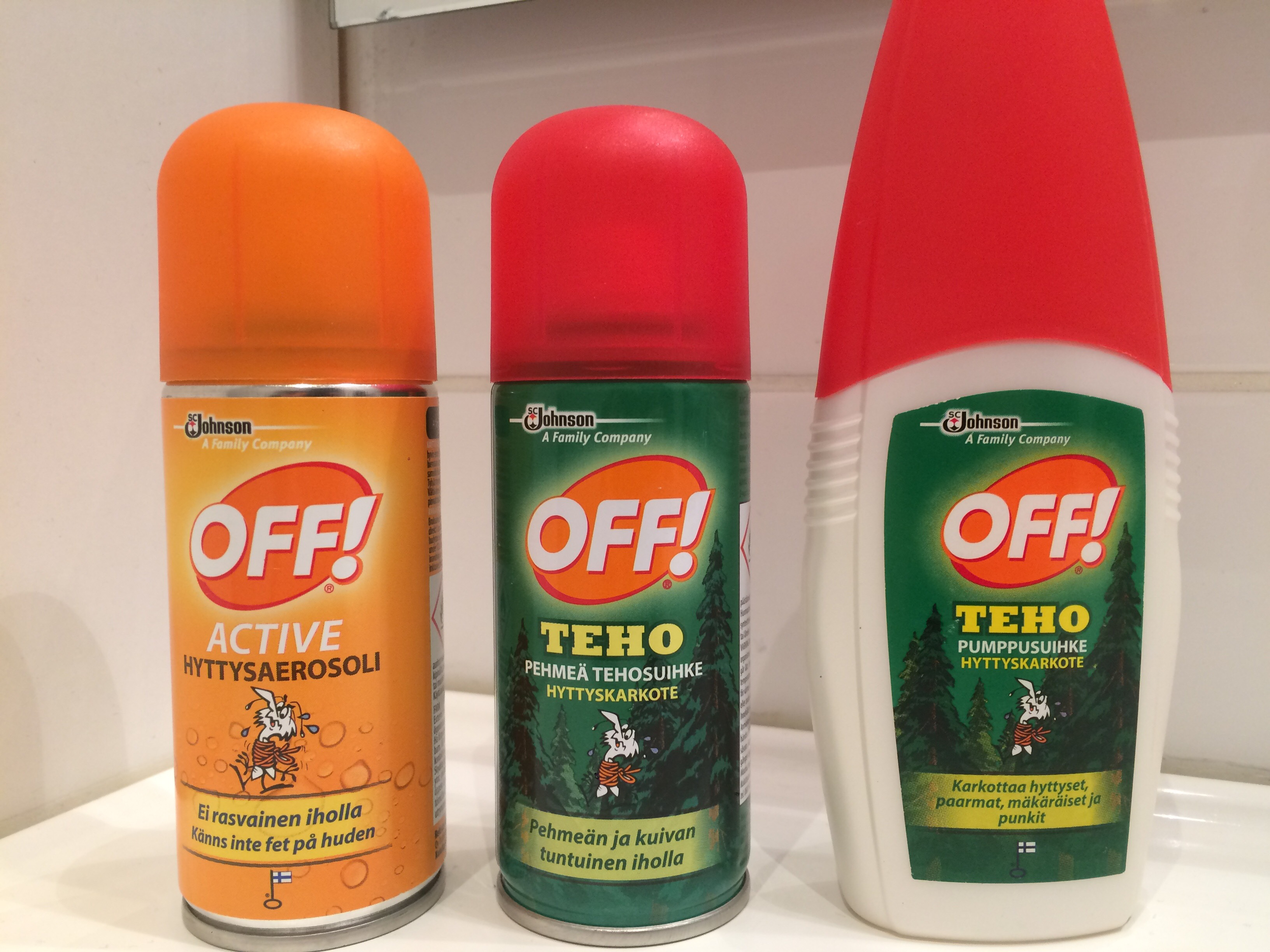 Off! tuotteita